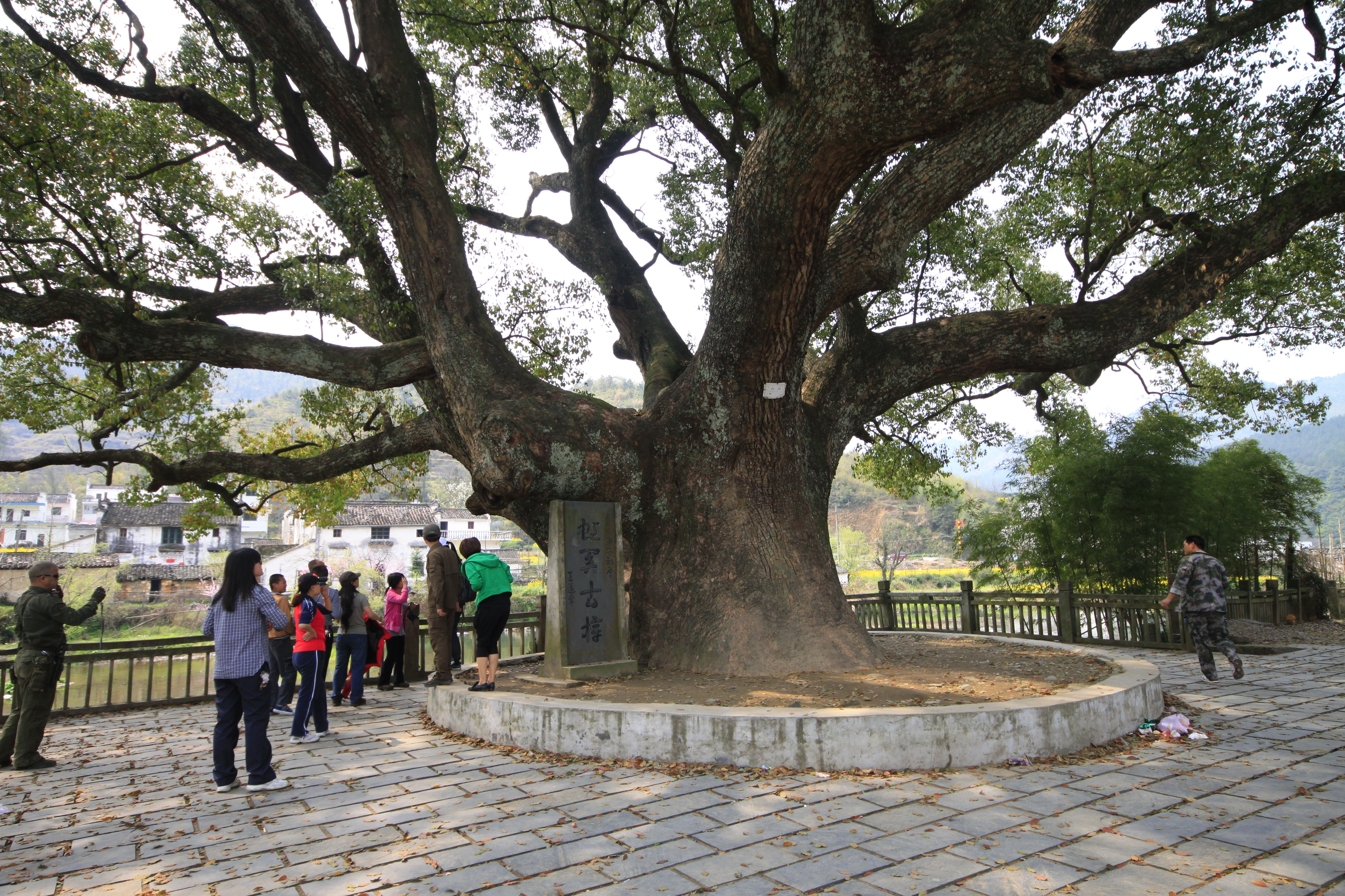 虹关村古樟，位于中国江西省婺源县浙源乡。